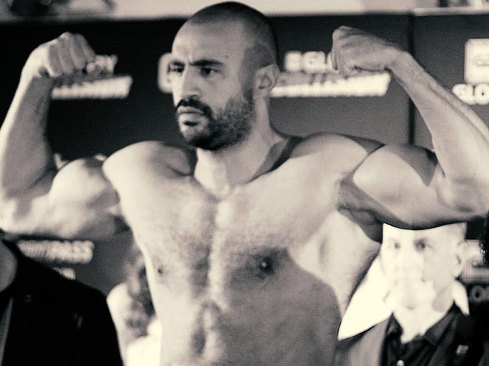 Badr Hari